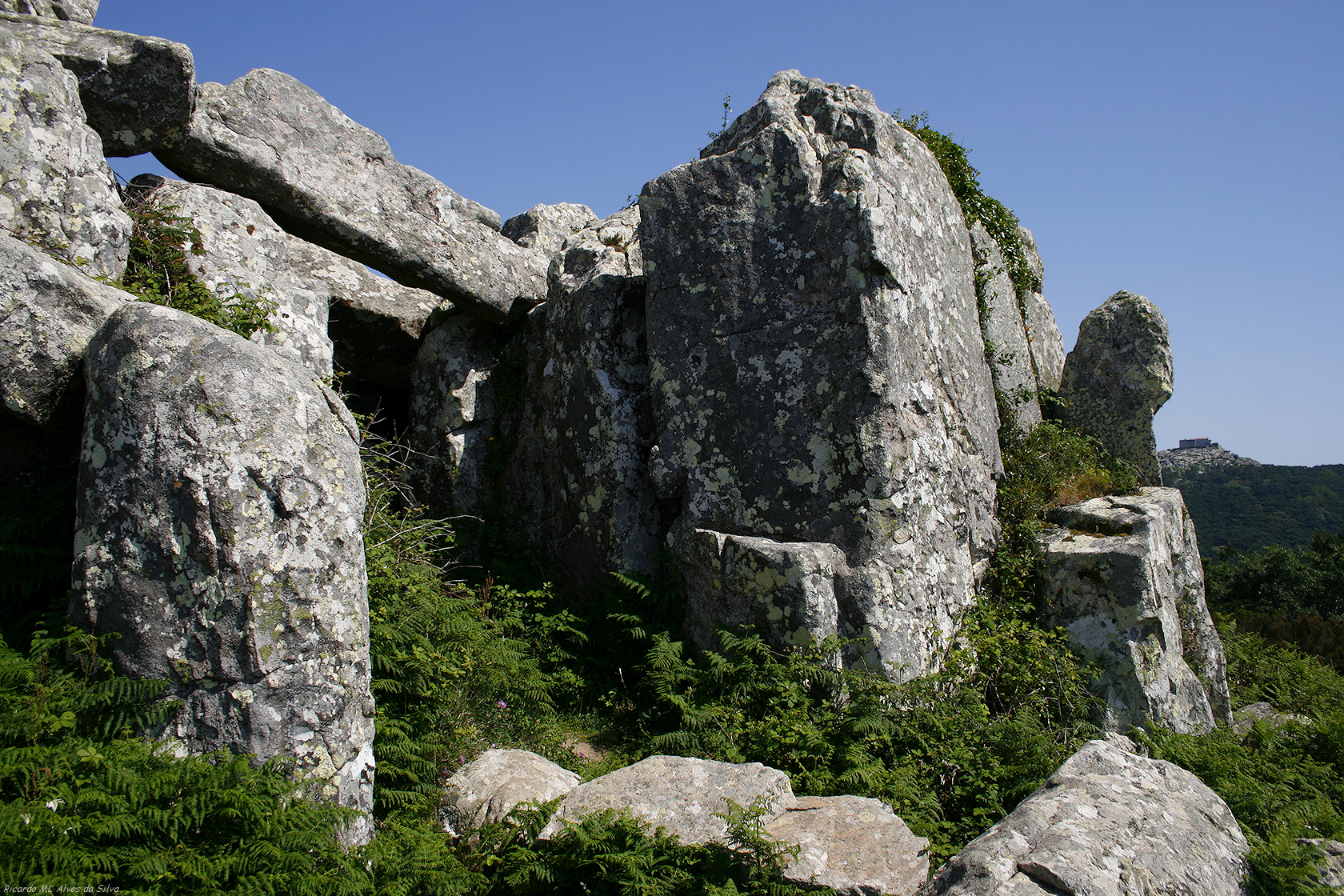 Face oeste e portal da Anta de Adrenunes na Serra de Sintra. Vista de norte para sul com Peninha no horizonte.